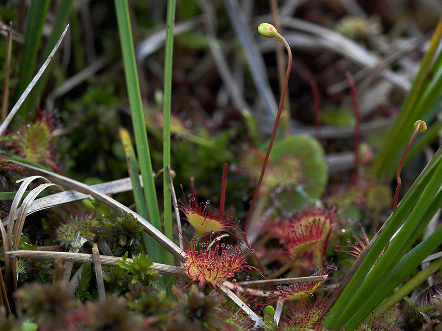 Drosera rotundifolia - Rundblättriger Sonnentau, alpine Zwergform